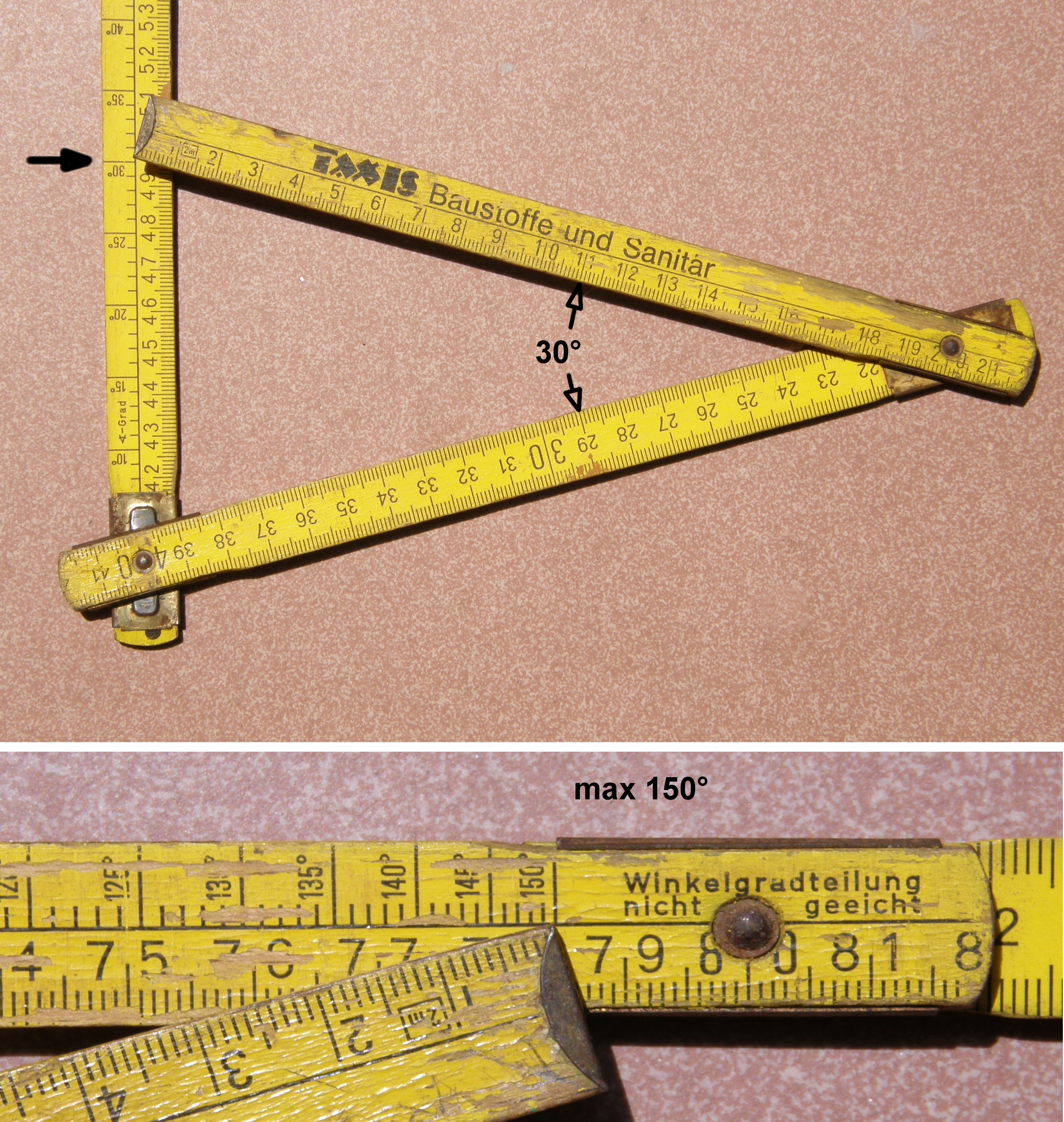 Winkelmessung -zeichnung mit Hilfe einer Scala am "Meter" (Zollstock) Das Bild zeigt einen (Beispiels-)Winkel von 30° und die maximal 150°- Stellung